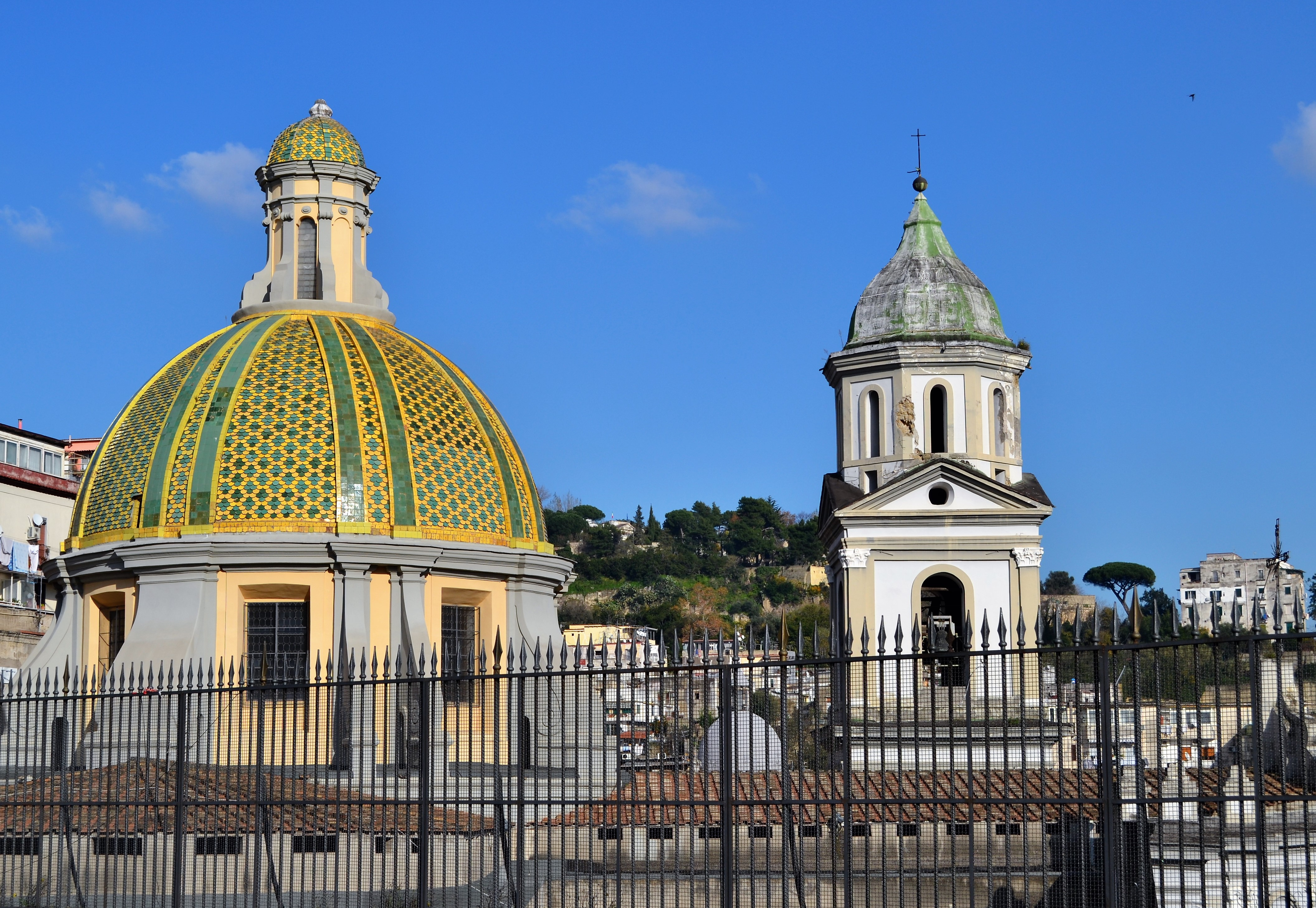 Cupola e campanile della basilica di Santa Maria della Sanità di Napoli